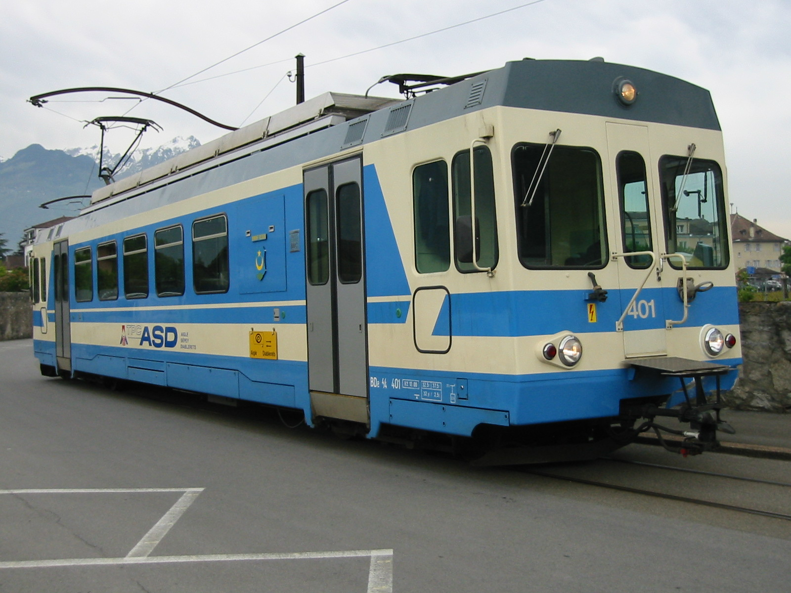 Source: User:Filzstift Description: Triebwagen ASD, Switzerland